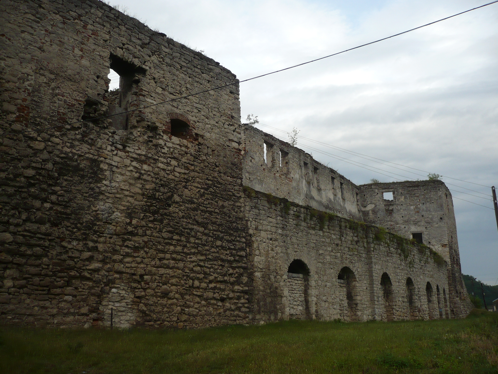 Czortków. Zamek